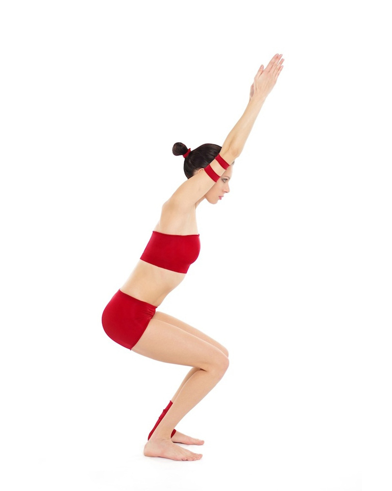 Utkatasana by Nina Mel, Yoga Teacher